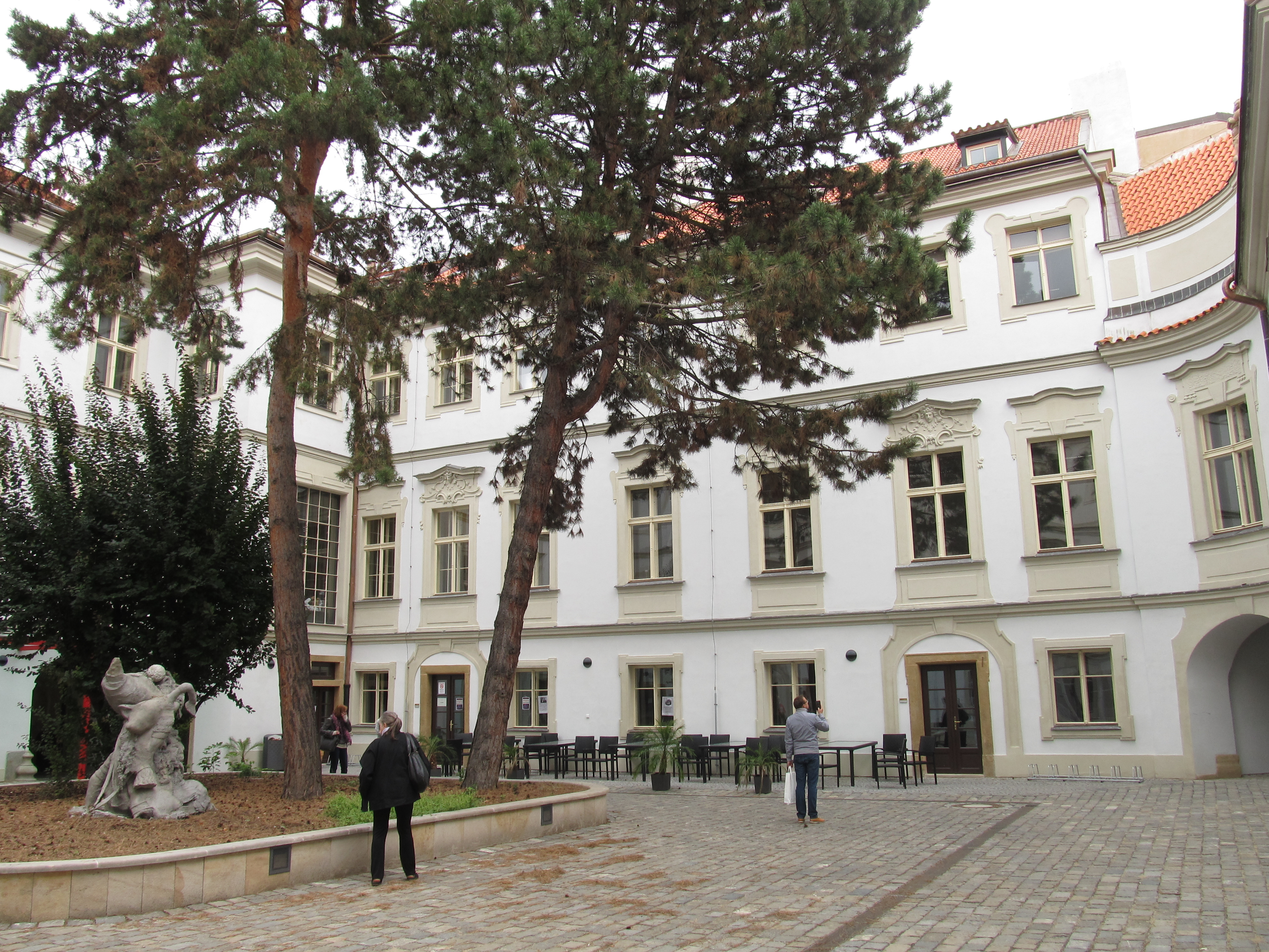 Nádvoří paláce Thurn-Taxisů.